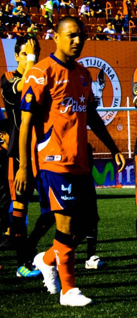 Mexico vs independiente de Medellin, partido de la seleccion mexicana jugado en el estadio Caliente de Tijuana, mas info videos y fotos en